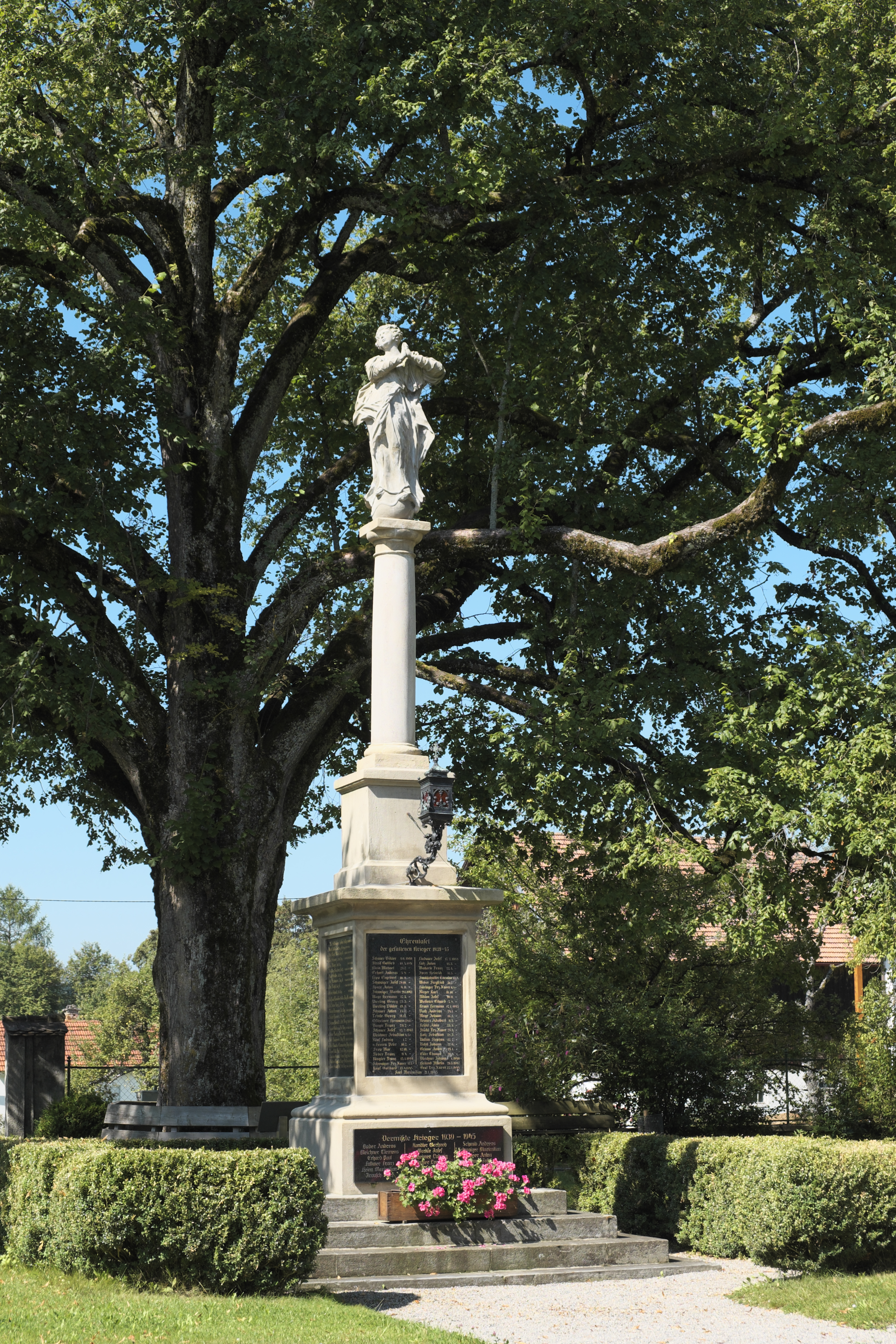 Kloster Rottenbuch in Rottenbuch im Landkreis Weilheim-Schongau (Bayern/Deutschland), Mariensäule